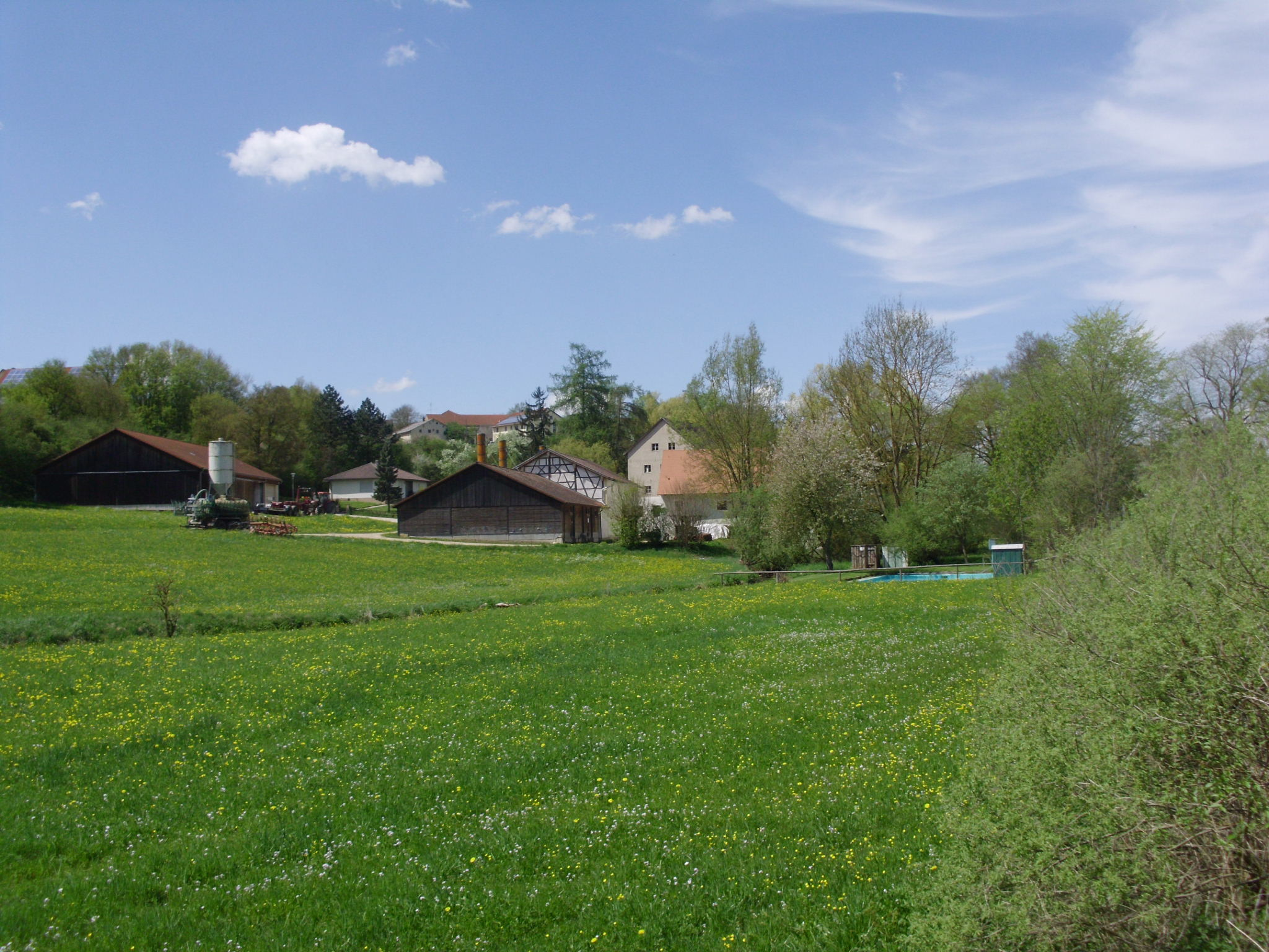 Waldmühle bei Gersdorf, einem Ortsteil von Nennslingen im mittelfränkischen Landkreis Weißenburg-Gunzenhausen